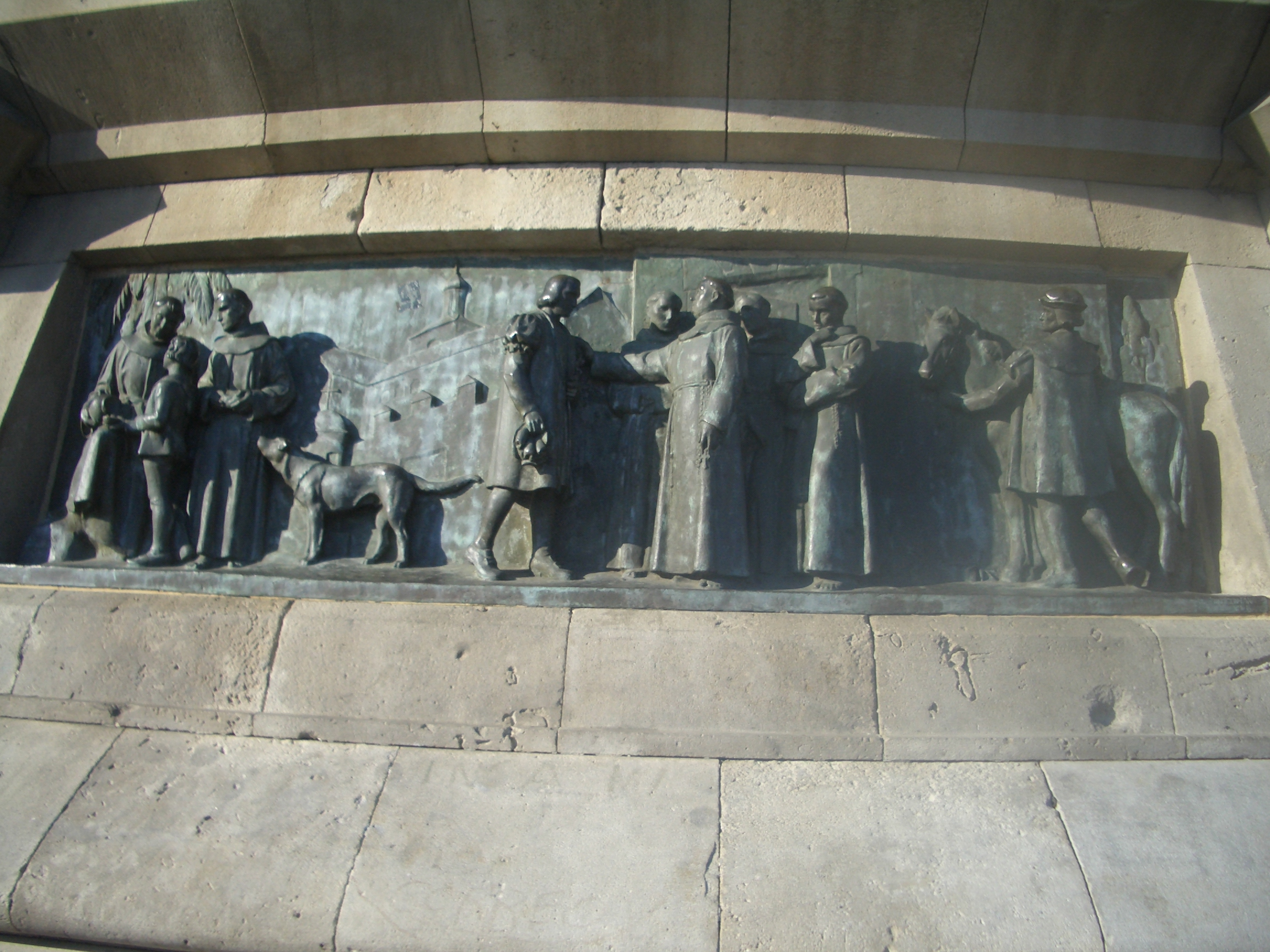 Detalle del Monumento a Colón, Barcelona,España.